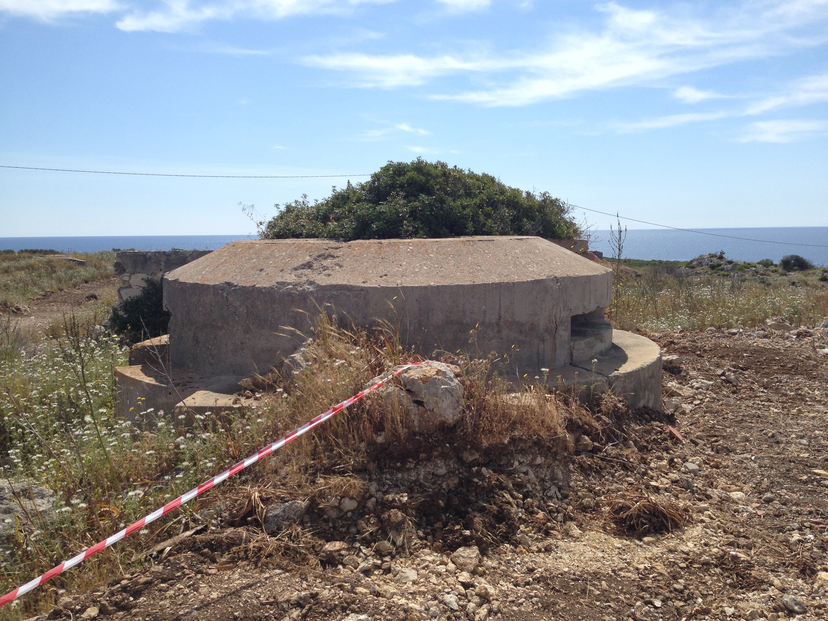 Resti della vecchia batteria antiaerea Lamba Doria al Plemmirio di Siracusa.